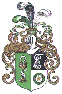 Studentenwappen der Lettgallia zu Riga